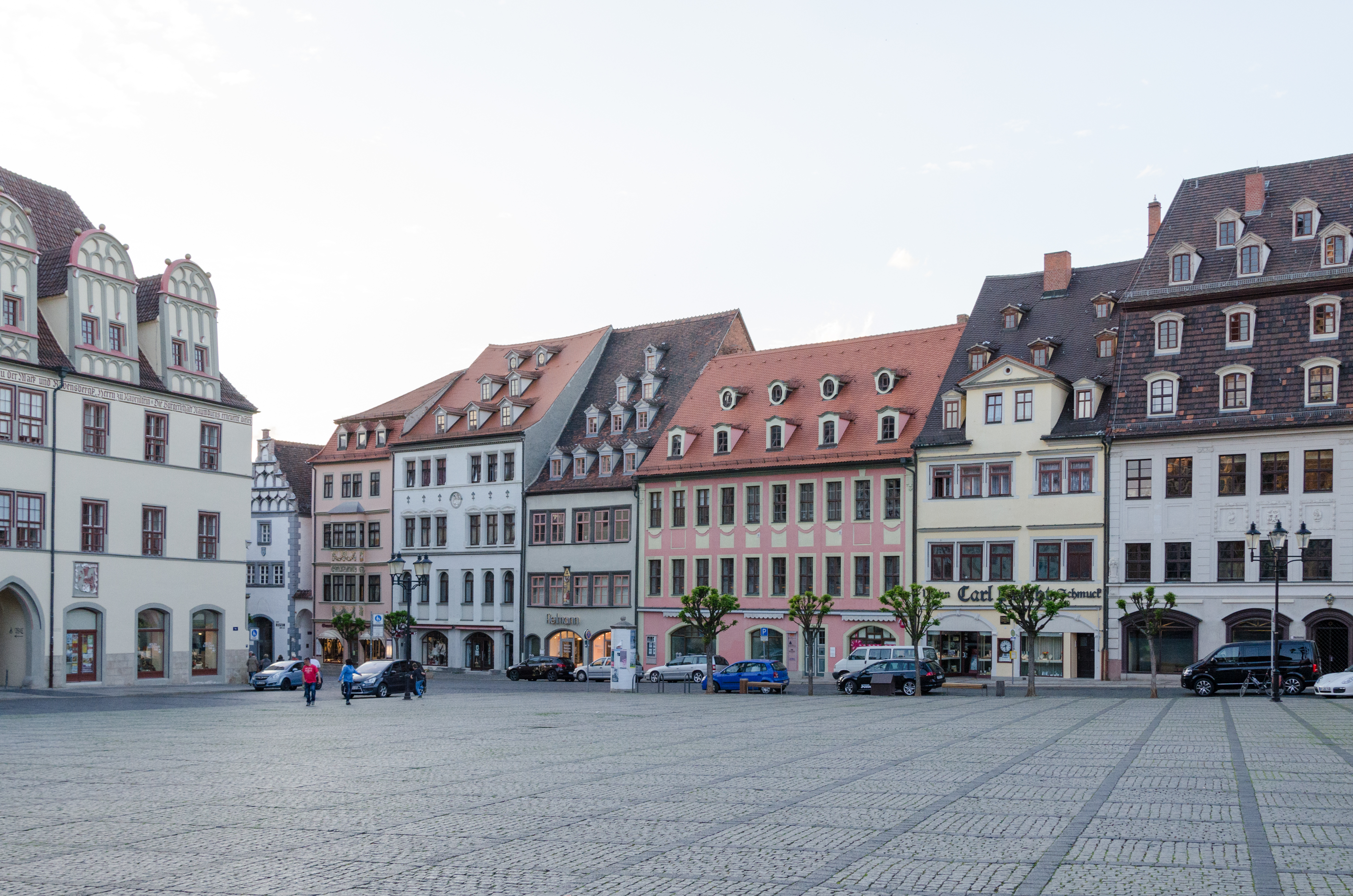 Naumburg, Markt, Nordseite